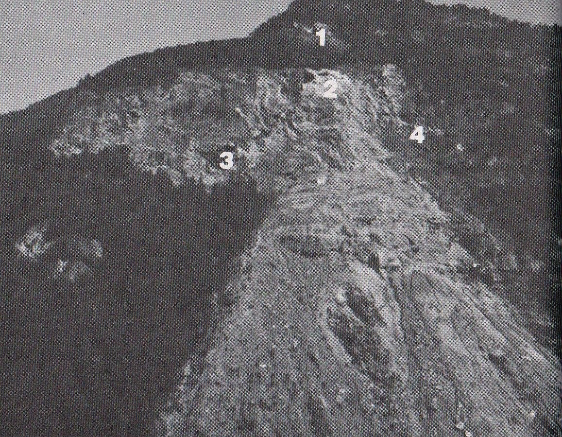 Vue d'ensemble de la montagne de la Roche Pourrie